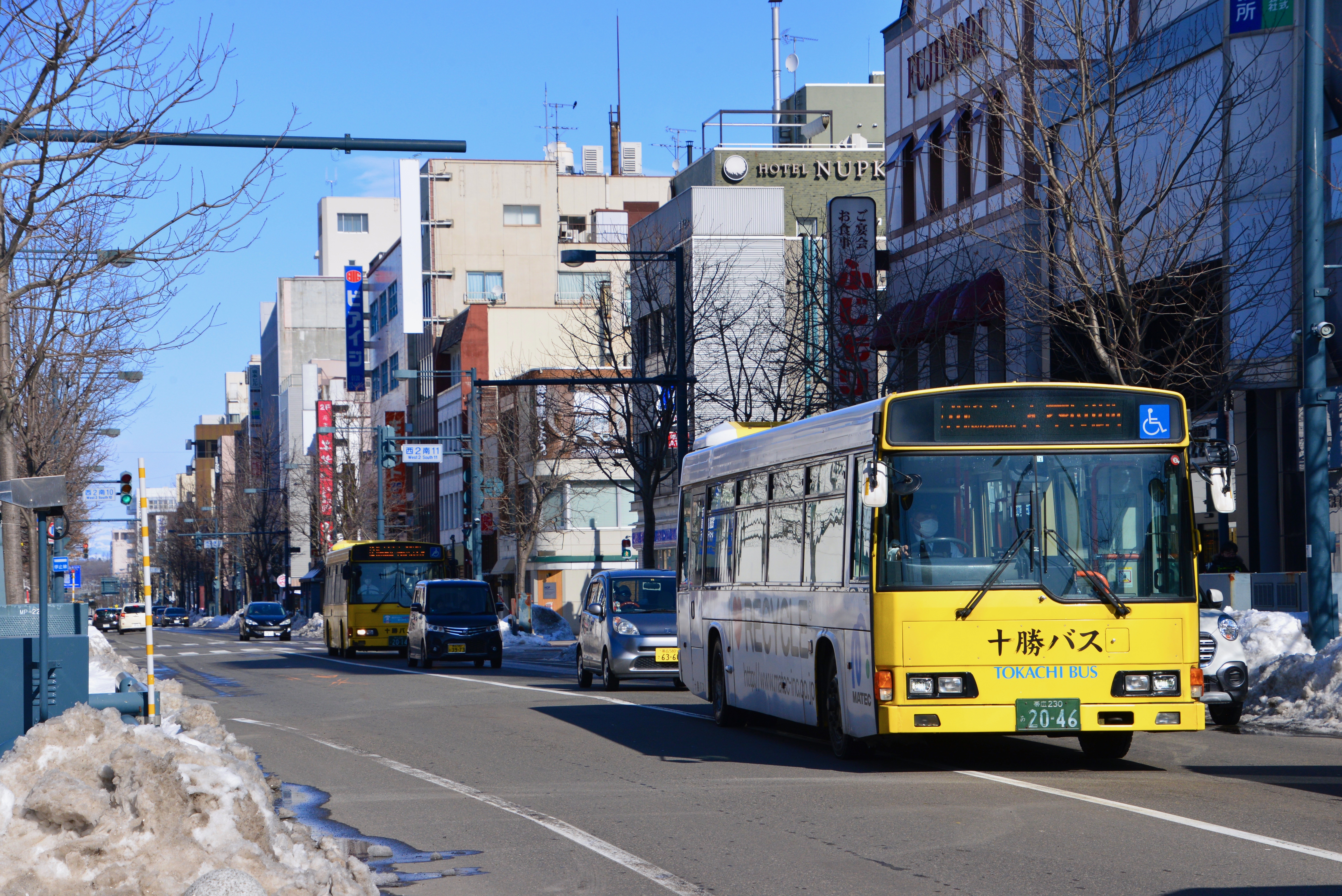 帯広市西２条通り